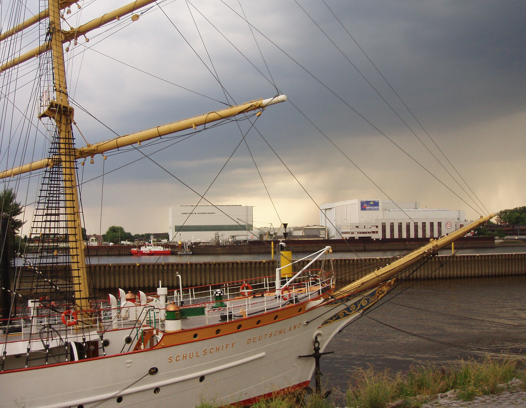 Bug der Schulschiff Deutschland